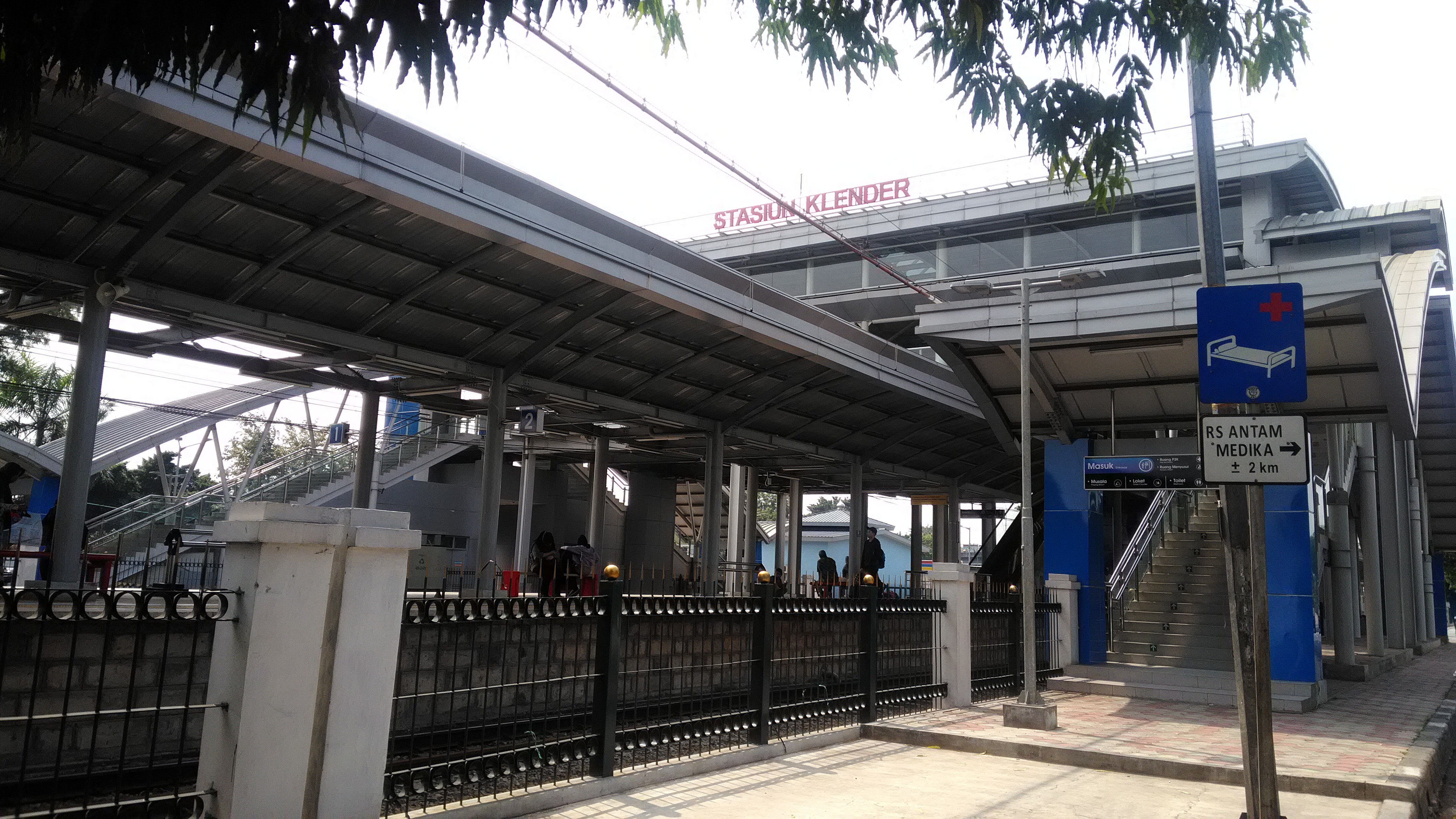 Stasiun Klender, 2019